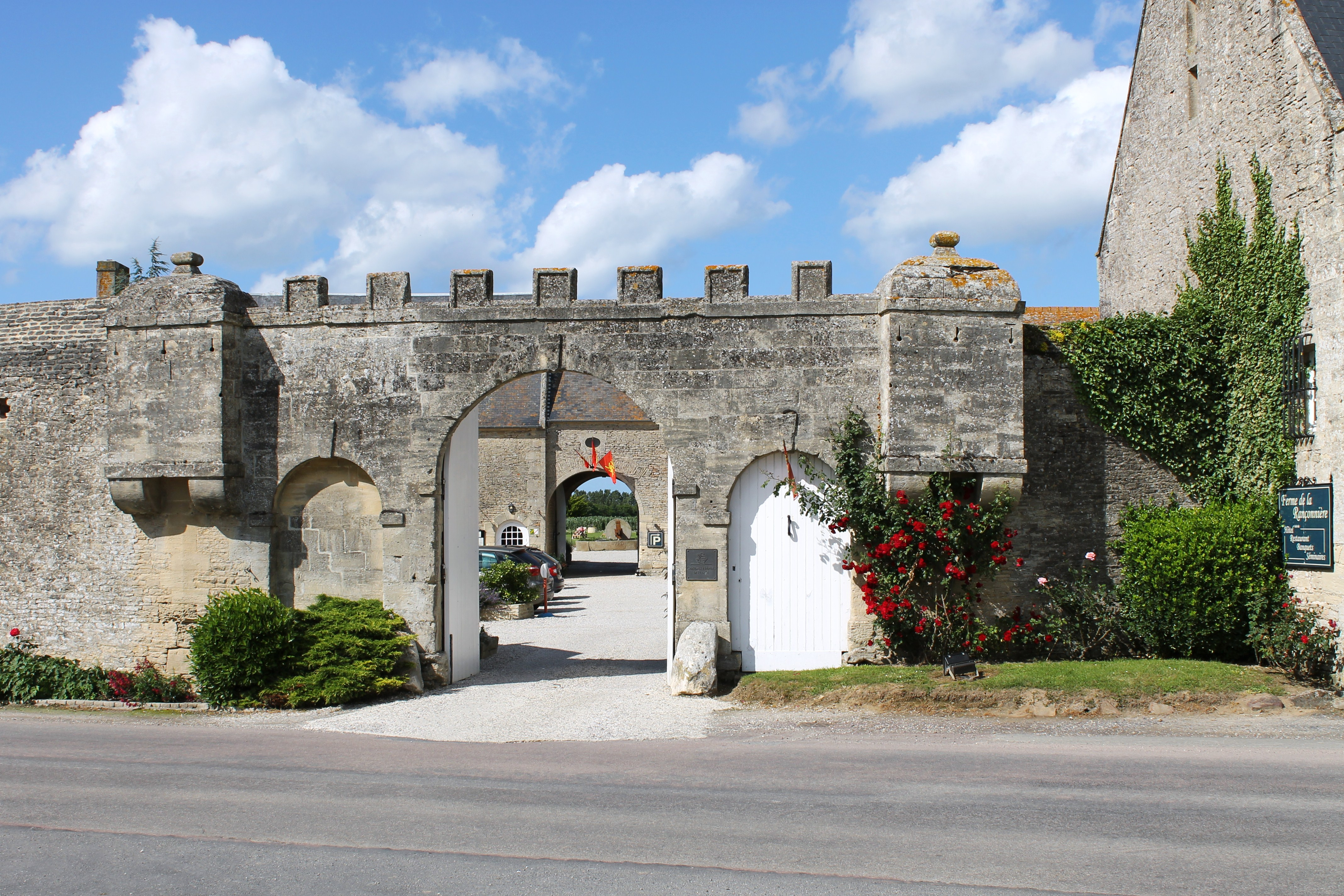 Portail de la Ferme de la Rançonnière (XVIIe siècle) à Crépon (Calvados) Base Mémoire